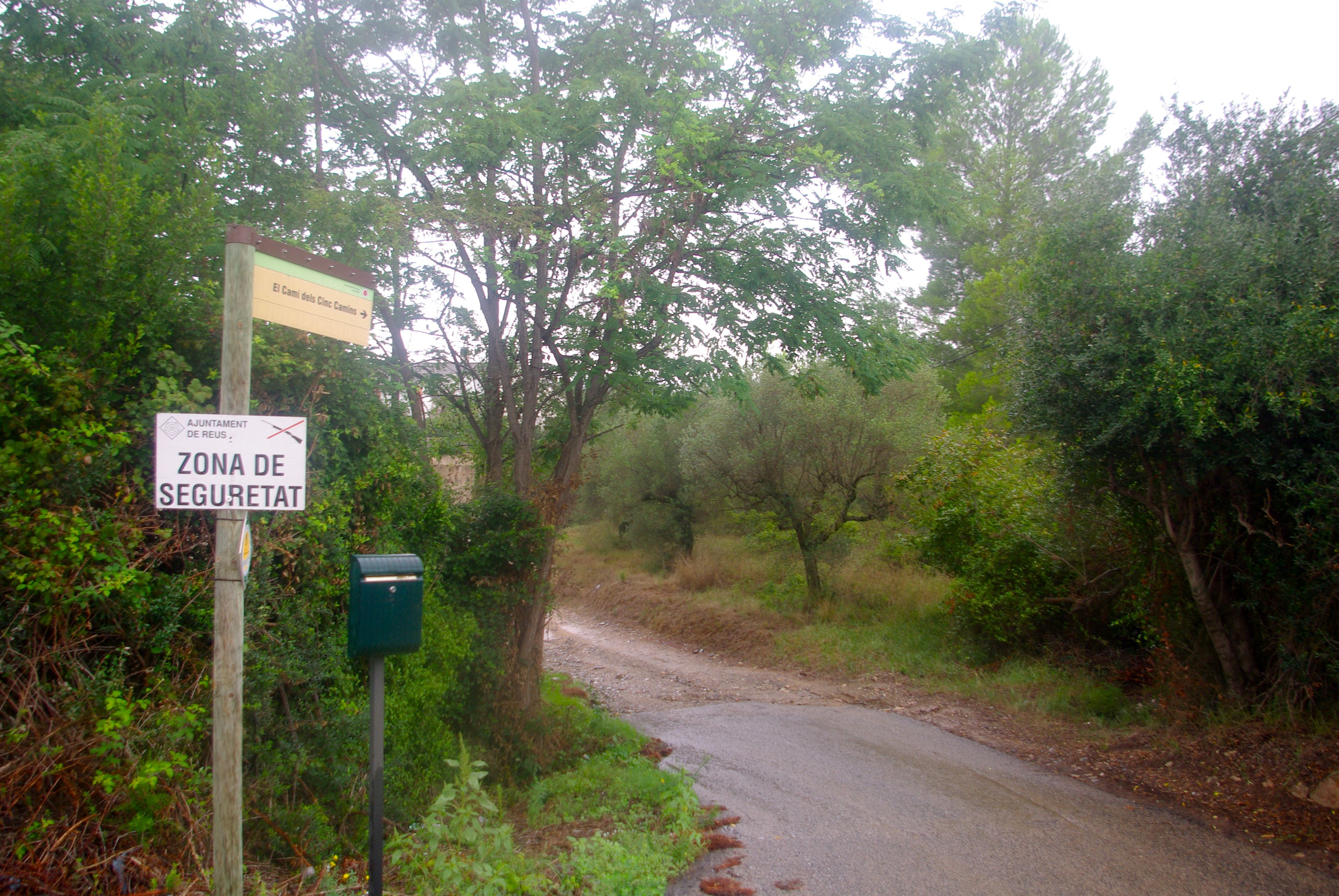 Tram del camí dels Cinc Camins vora el Mas de la Victòria, al terme de Reus